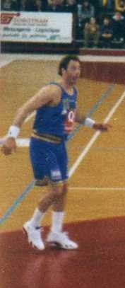 Hervé Dubuisson sous le maillot de Montpelier